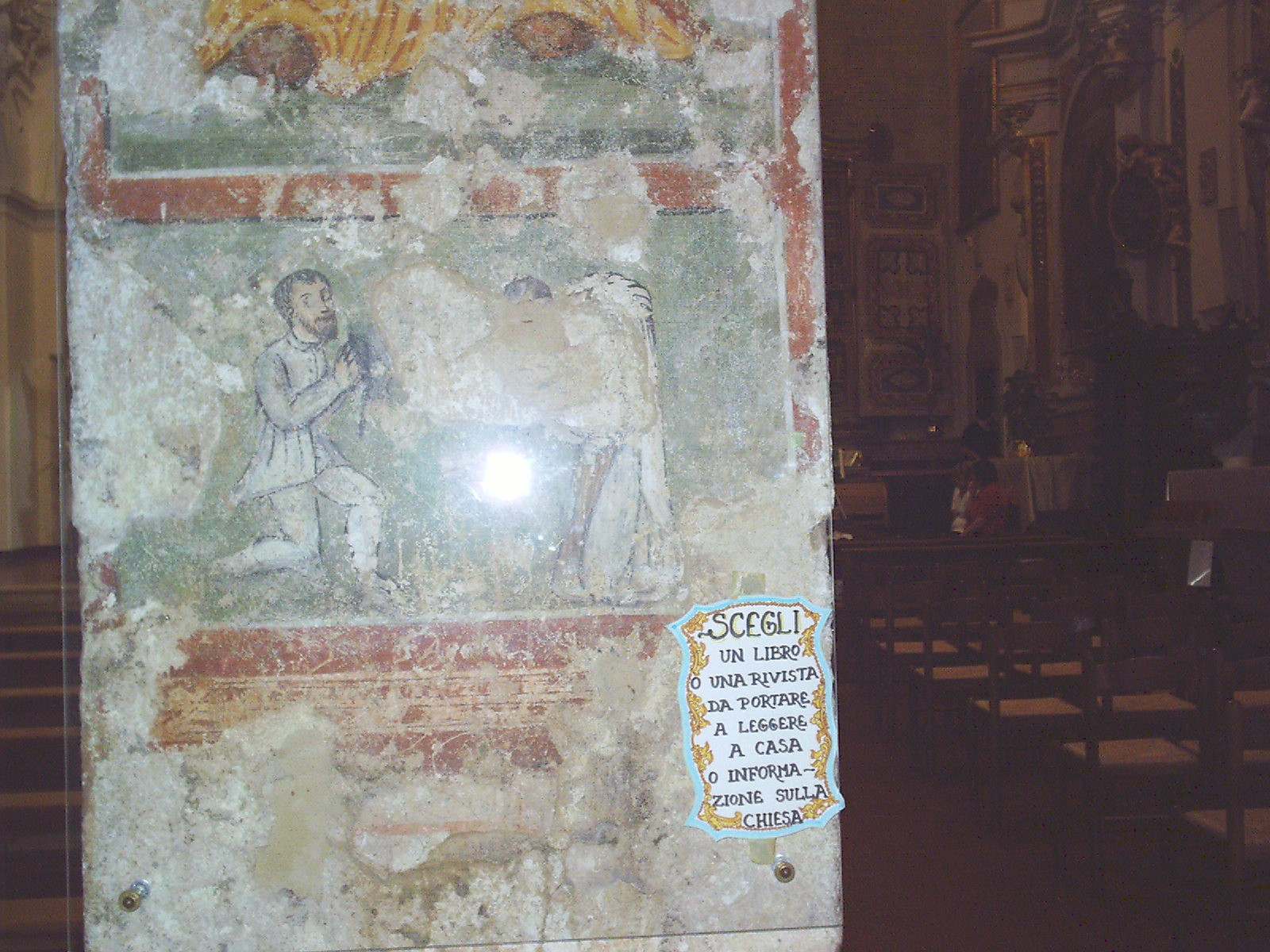 Un aristocratico o San Domenico di Sora che prega con un rosario davanti alla figura parzialmente scrostata di un angelo. Affresco su colonna della Chiesa della Madonna della Valle di Scanno.